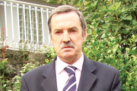 Médico, Presidente da Assembleia Municipal de Lousada (1989-2012)